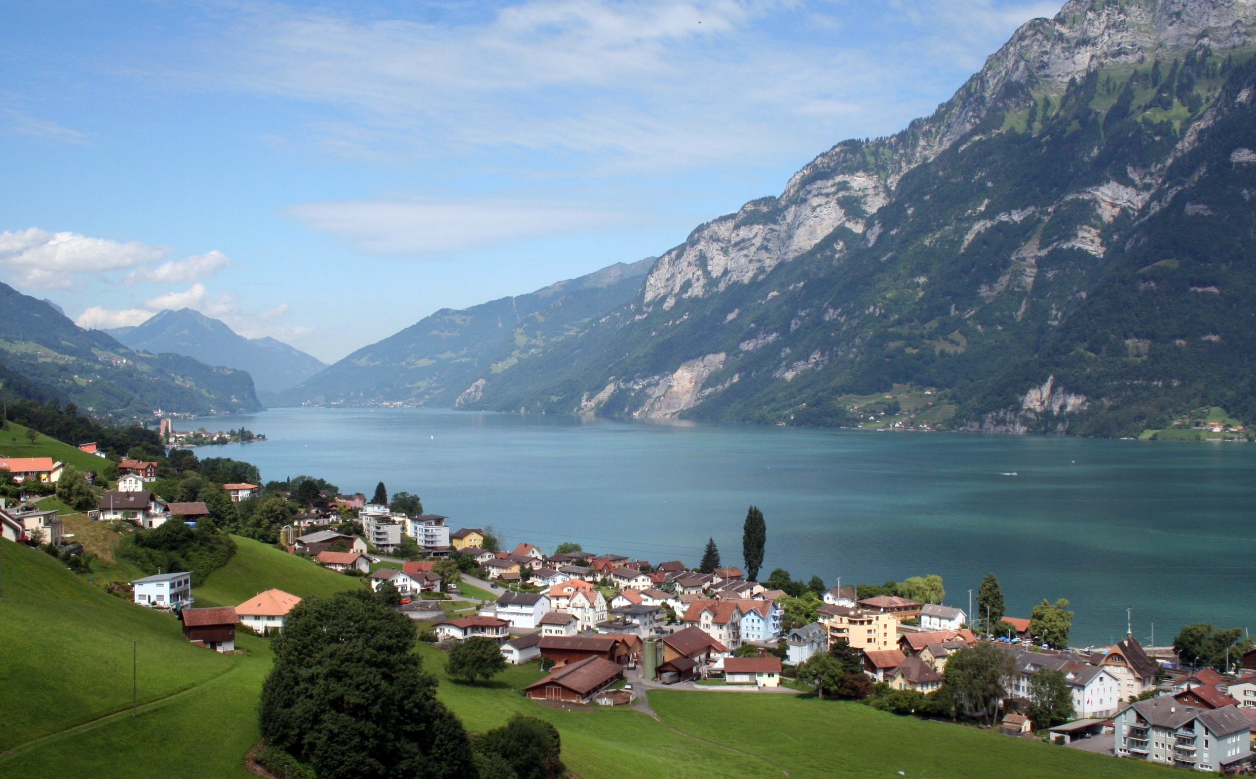 Walensee Richtung West mit Unterterzen